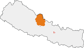 Położenie Obszaru Chronionego Annapurny (Annapurna Conservation Area)